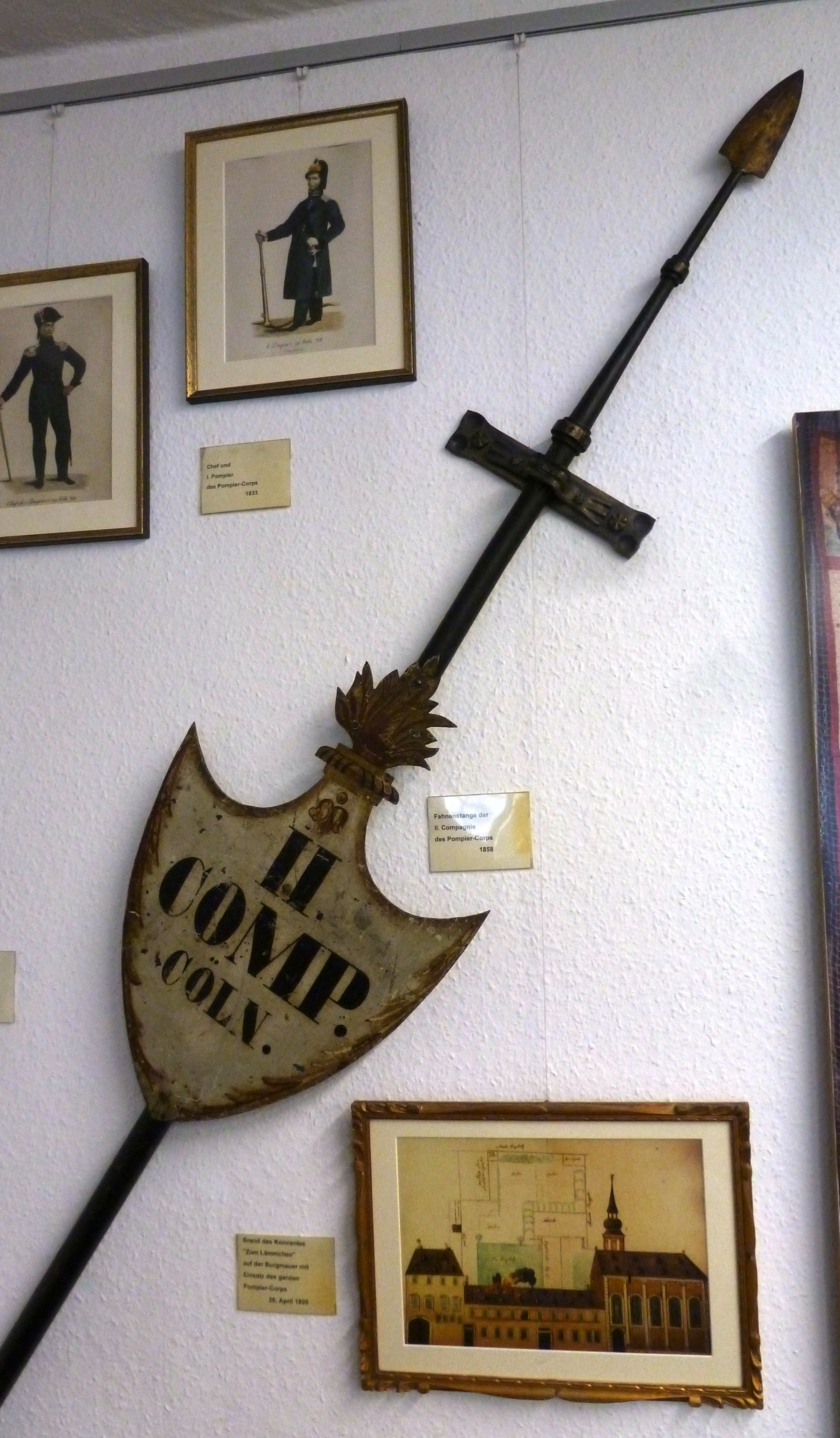 Historische Lehrsammlung der Berufsfeuerwehr Köln: Fahnenstange der II. Companie des Pompiers-Corps 1858